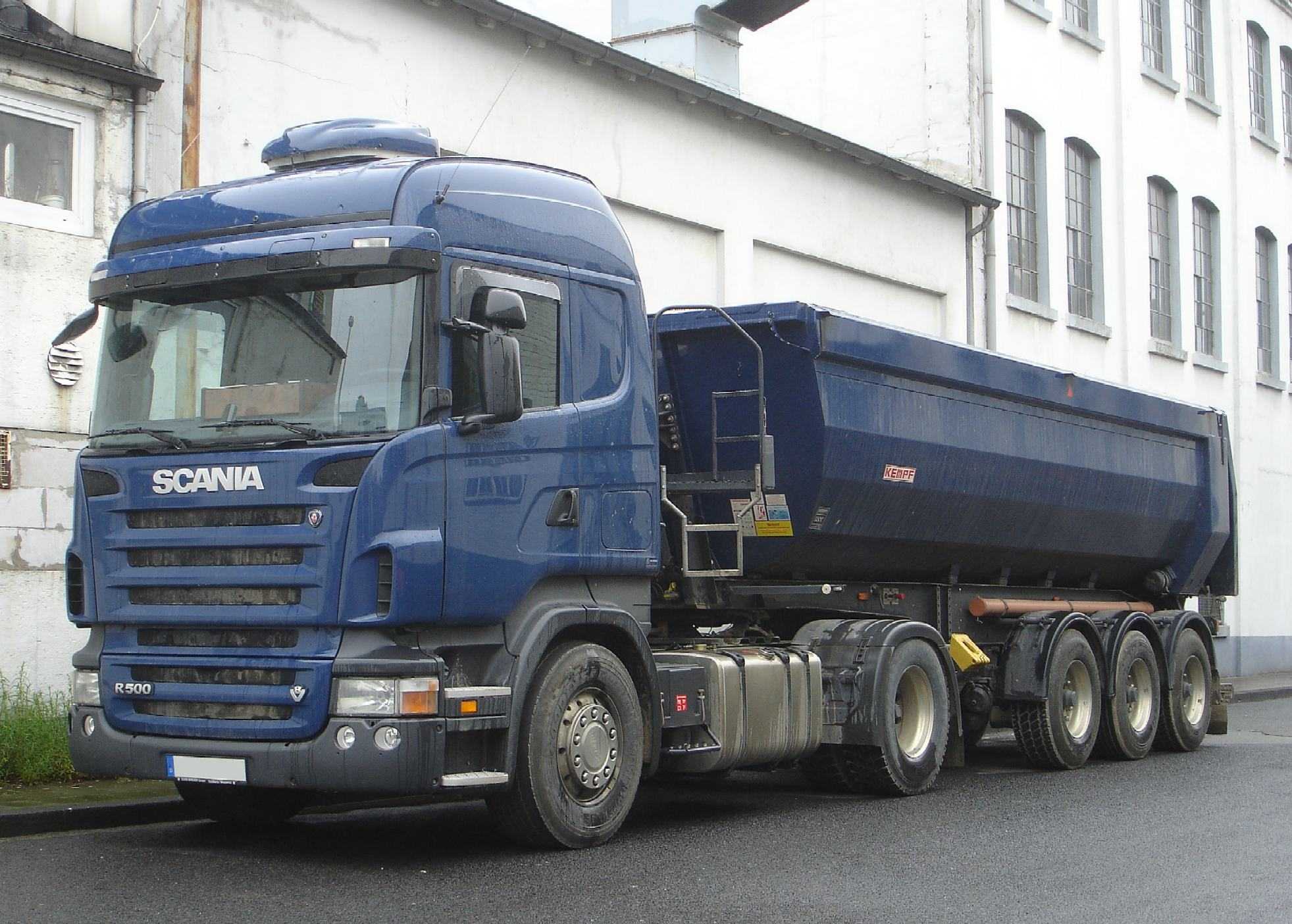 Scania R500 Kippsattelzug